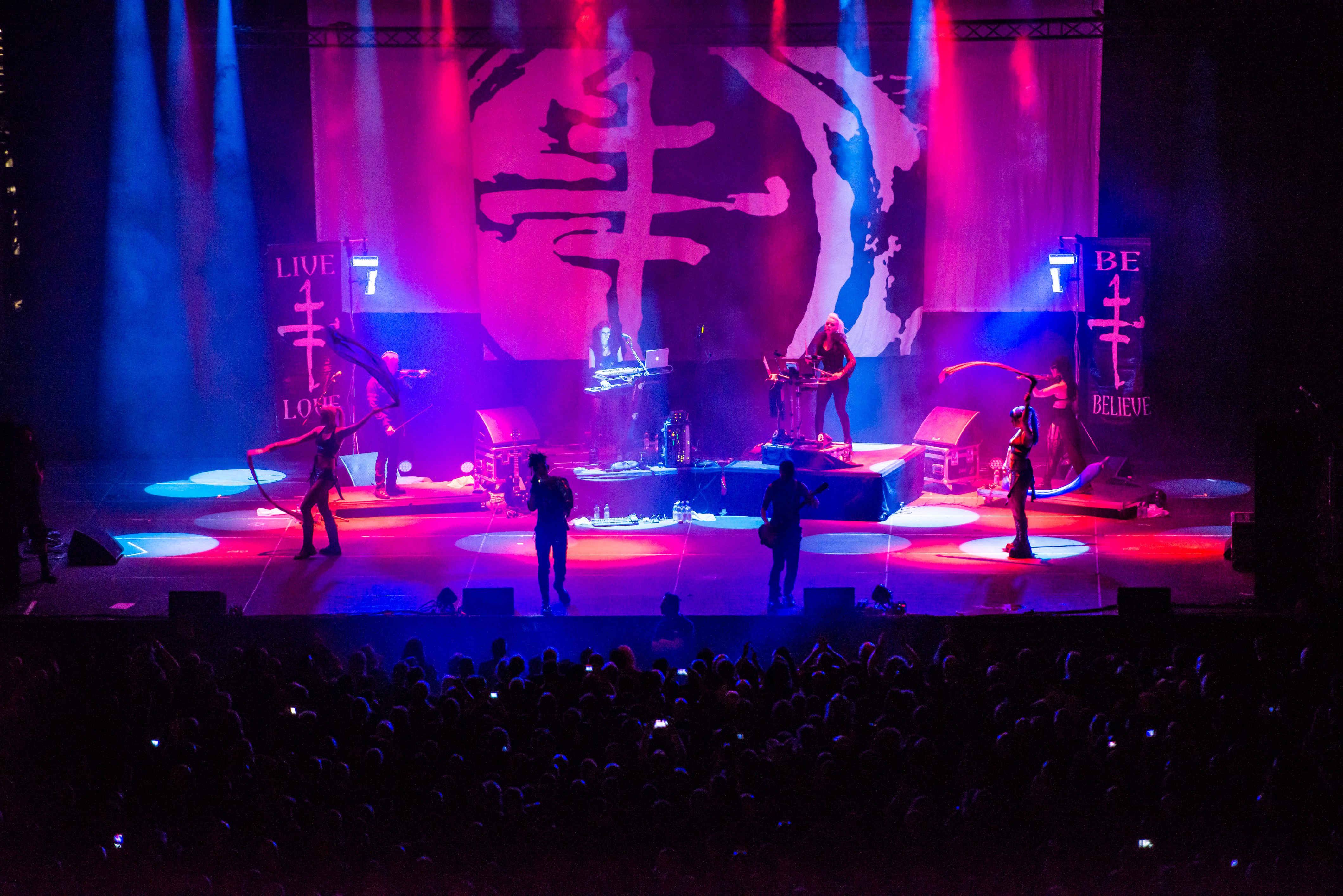 'Amphi Festival 2015; Köln - Lanxess Arena': 'The Crüxshadows'